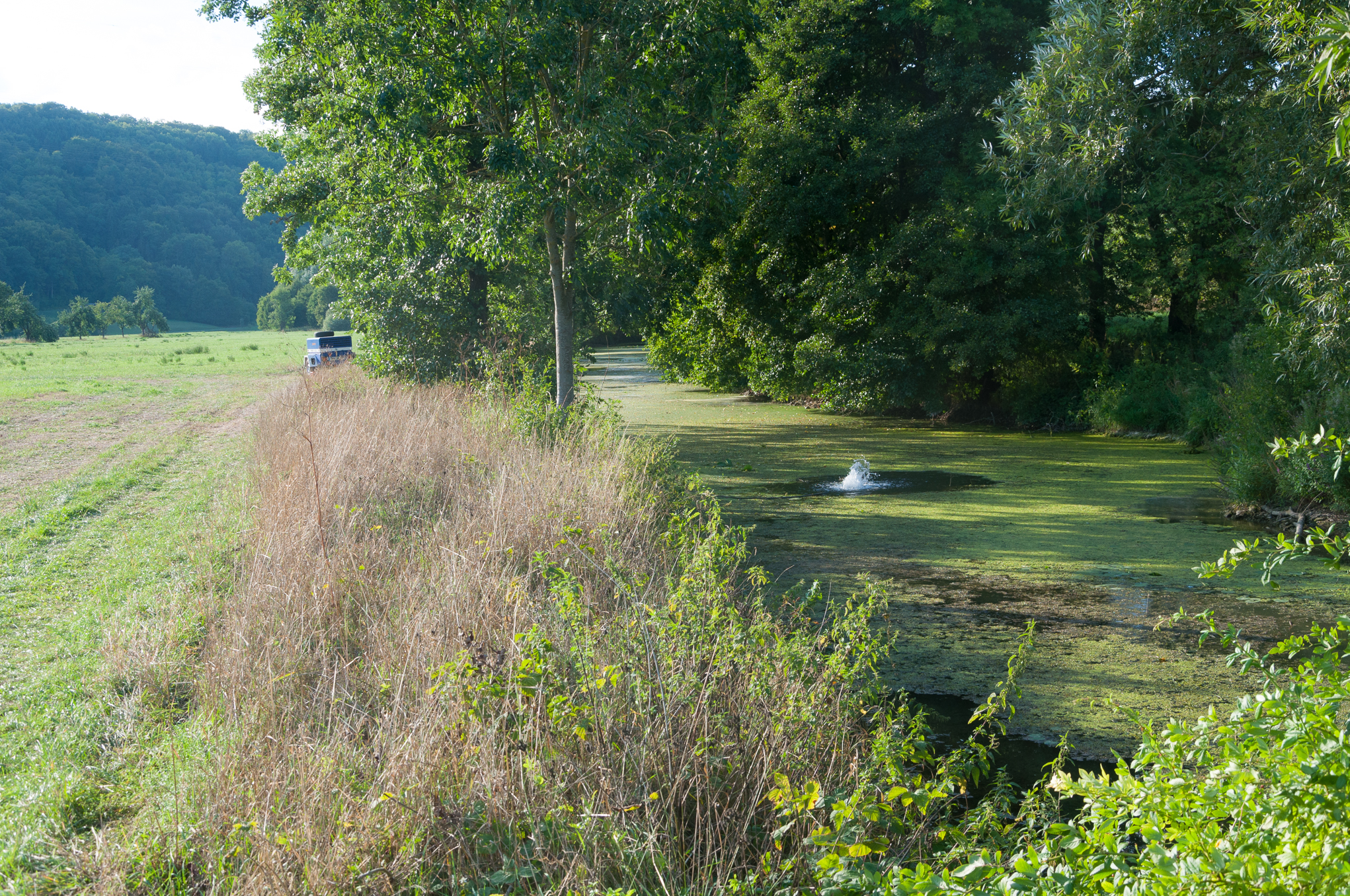 Ein Kompressor des THW belüftet einen Altarm der Jagst bei Mulfingen am 27. August 2015 nach der Kontamination mit Ammoniumnitrat